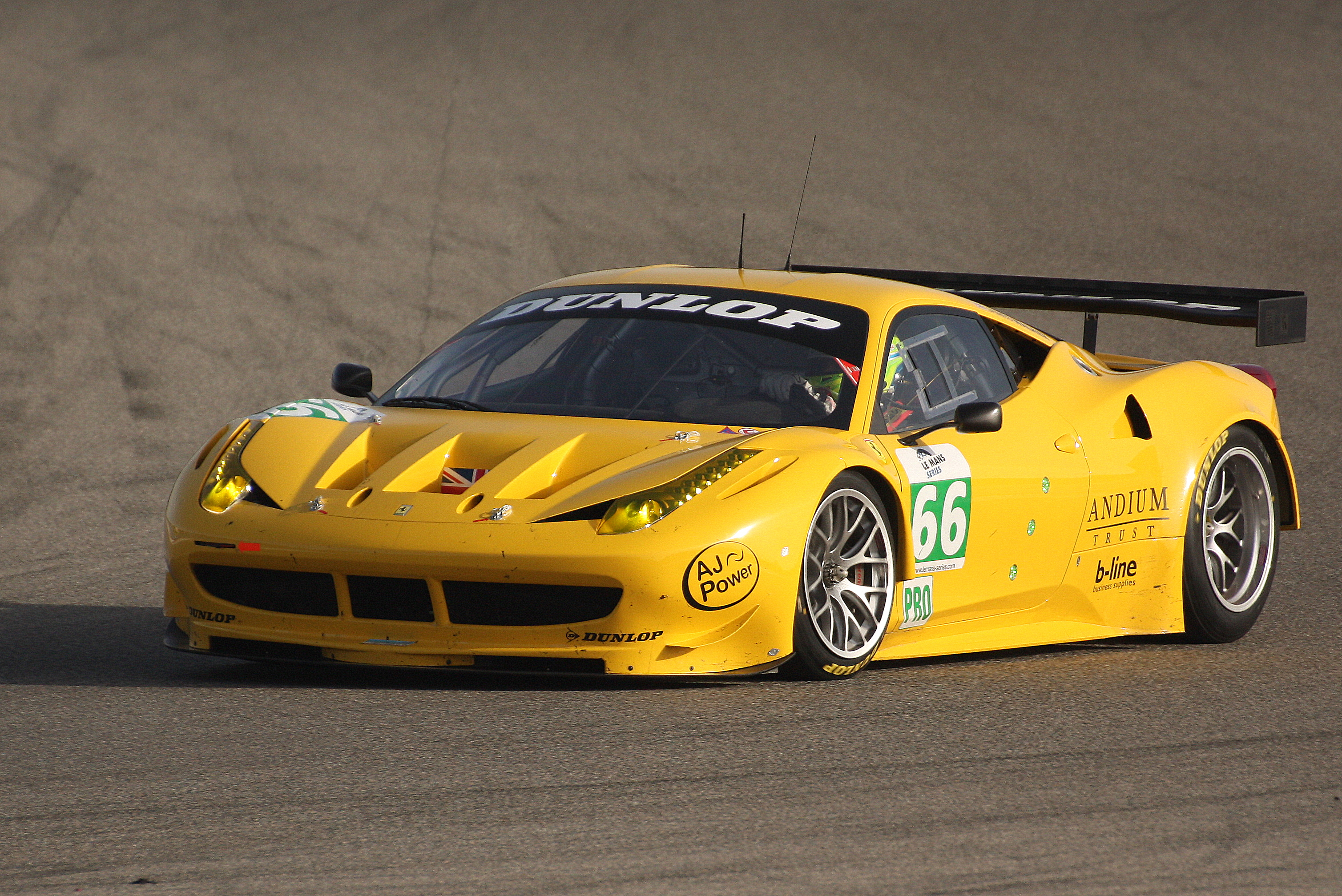 Ferrari 458 italia equipe JMW ( pilotes : Rob Bell et James Walker )